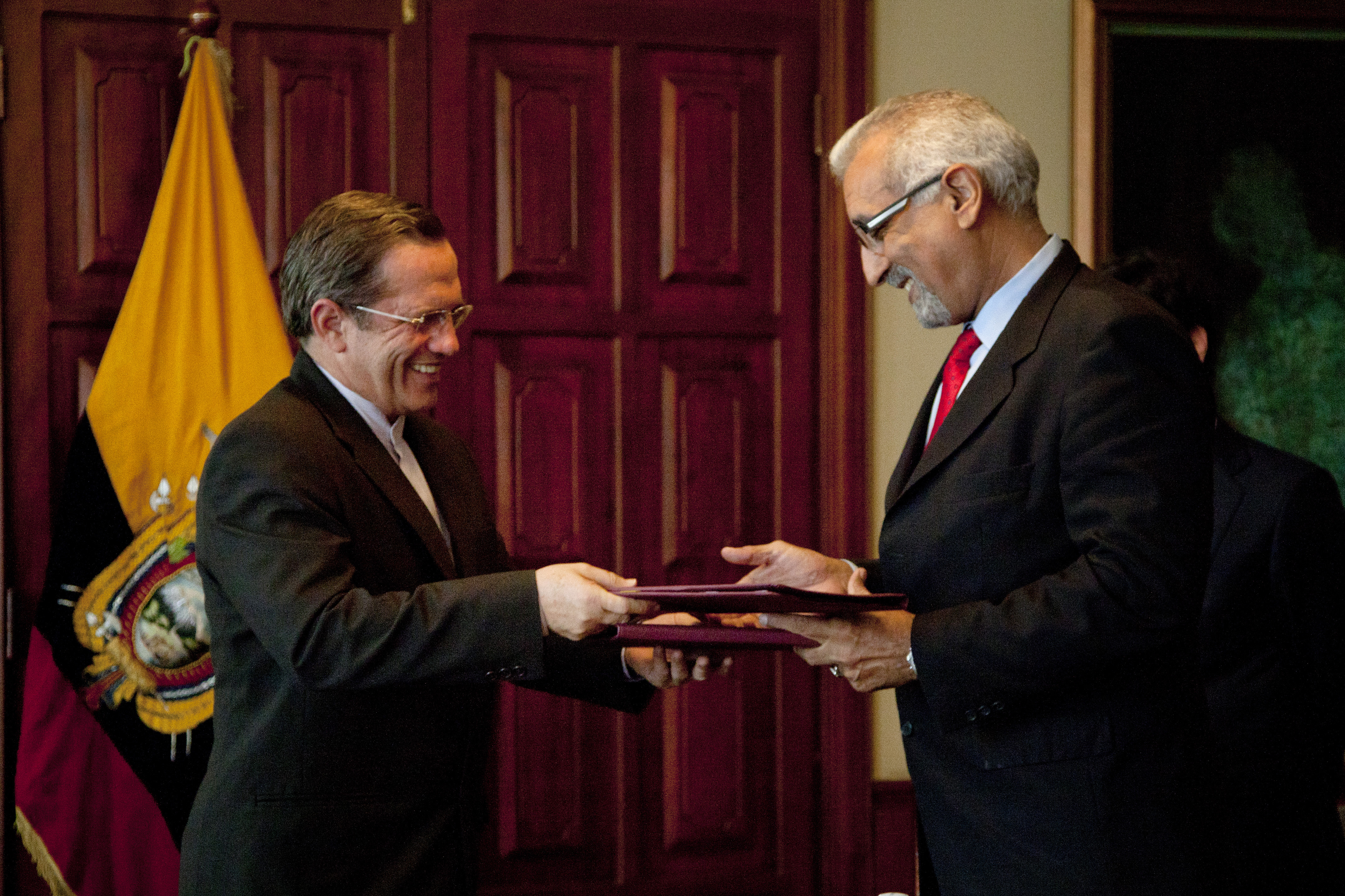 Quito (Ecuador), 12 de Julio 2012. En los salones de la Cancillería se realizó la firma del Memorandum de Entendimiento con la República Árabe Saharaui Democrática. Participaron el Canciller Ricardo Patiño y el Embajador M´Beirik Ahmed Adelahe. Foto: Fernanda LeMarie - Ministerio de Relaciones Exteriores, Comercio e Integración.